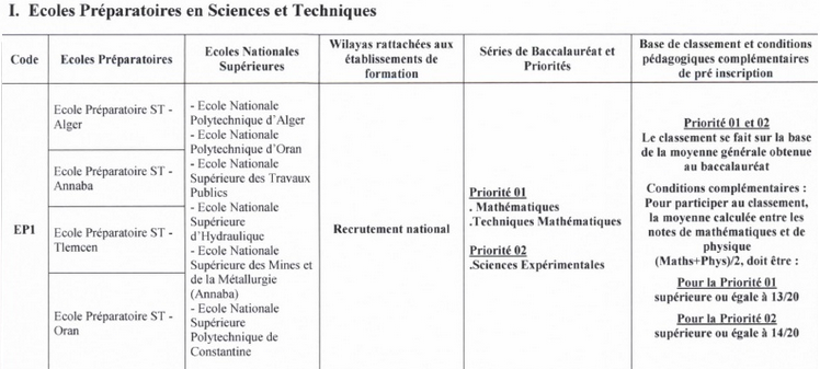 EPST condition d'admission et information.